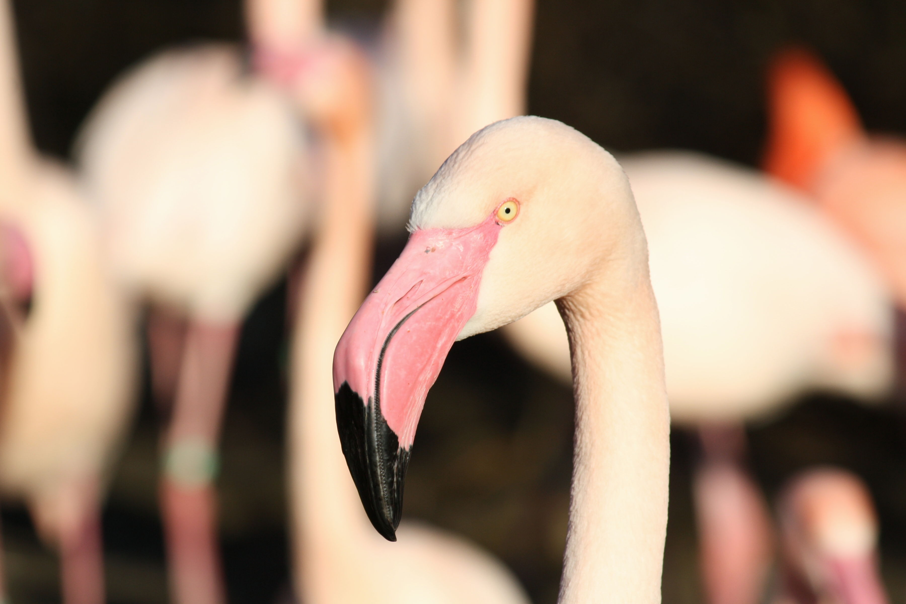 Plameňák v pražské ZOO